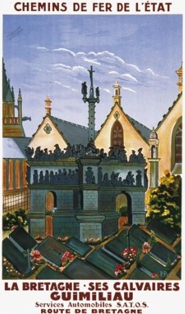 Affiche de propagande touristique des Chemins de fer de l'Etat 1930